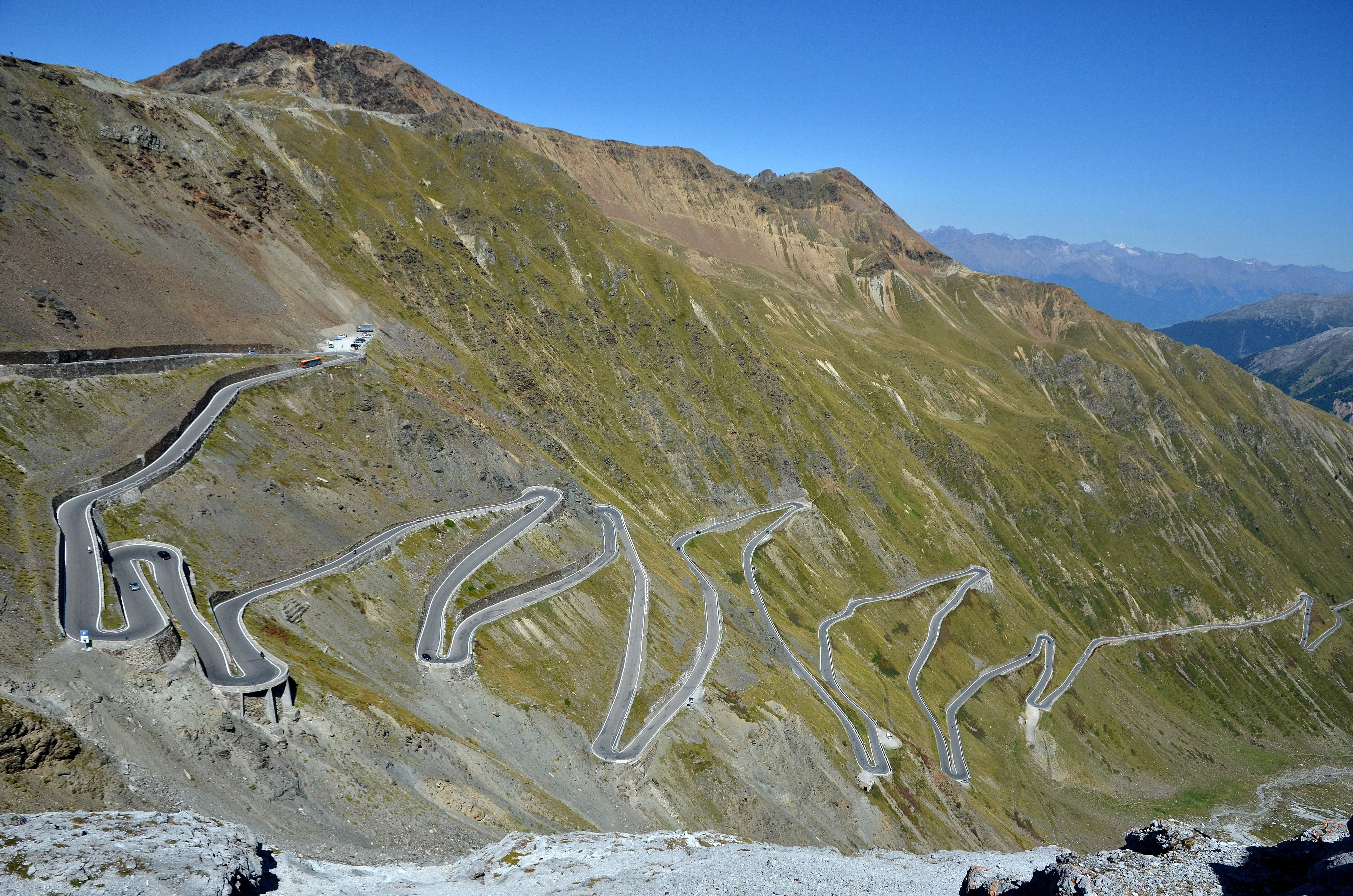 Zatáčky na Passo Stelvio